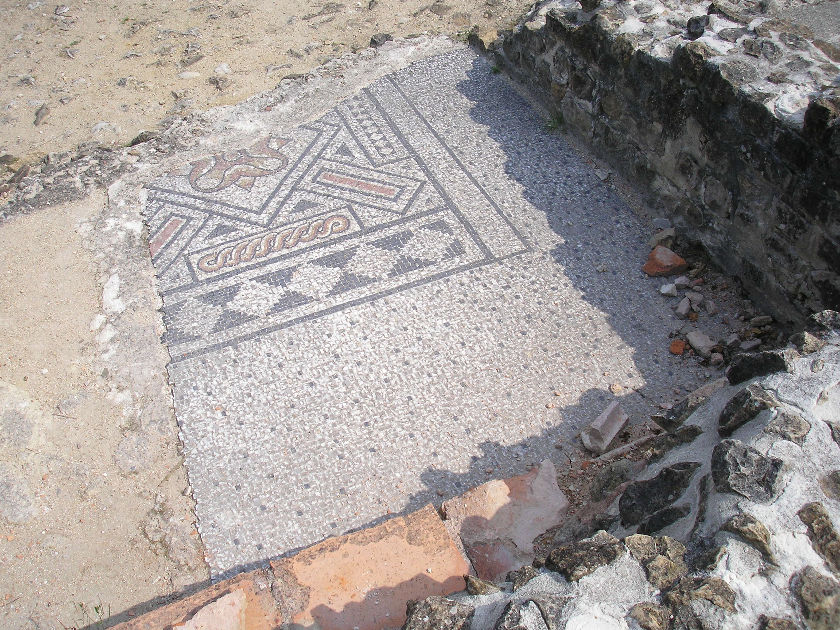 Mosaïque restituée de la maison au Grand Péristyle à Vieux-la-Romaine (Calvados, Normandie, France). La destruction de la mosaïque en 330-340 pour le passage du cardo est visible.